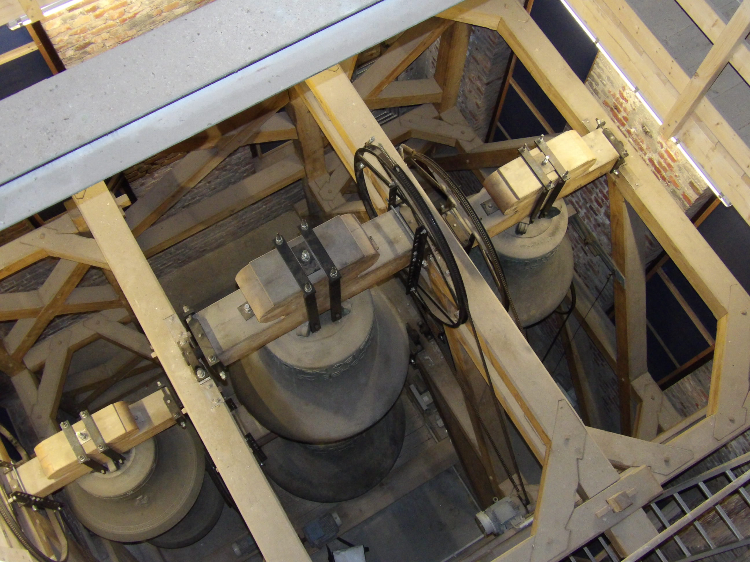 Die sechs Glocken der Kathedrale St. Jakobus in Görlitz